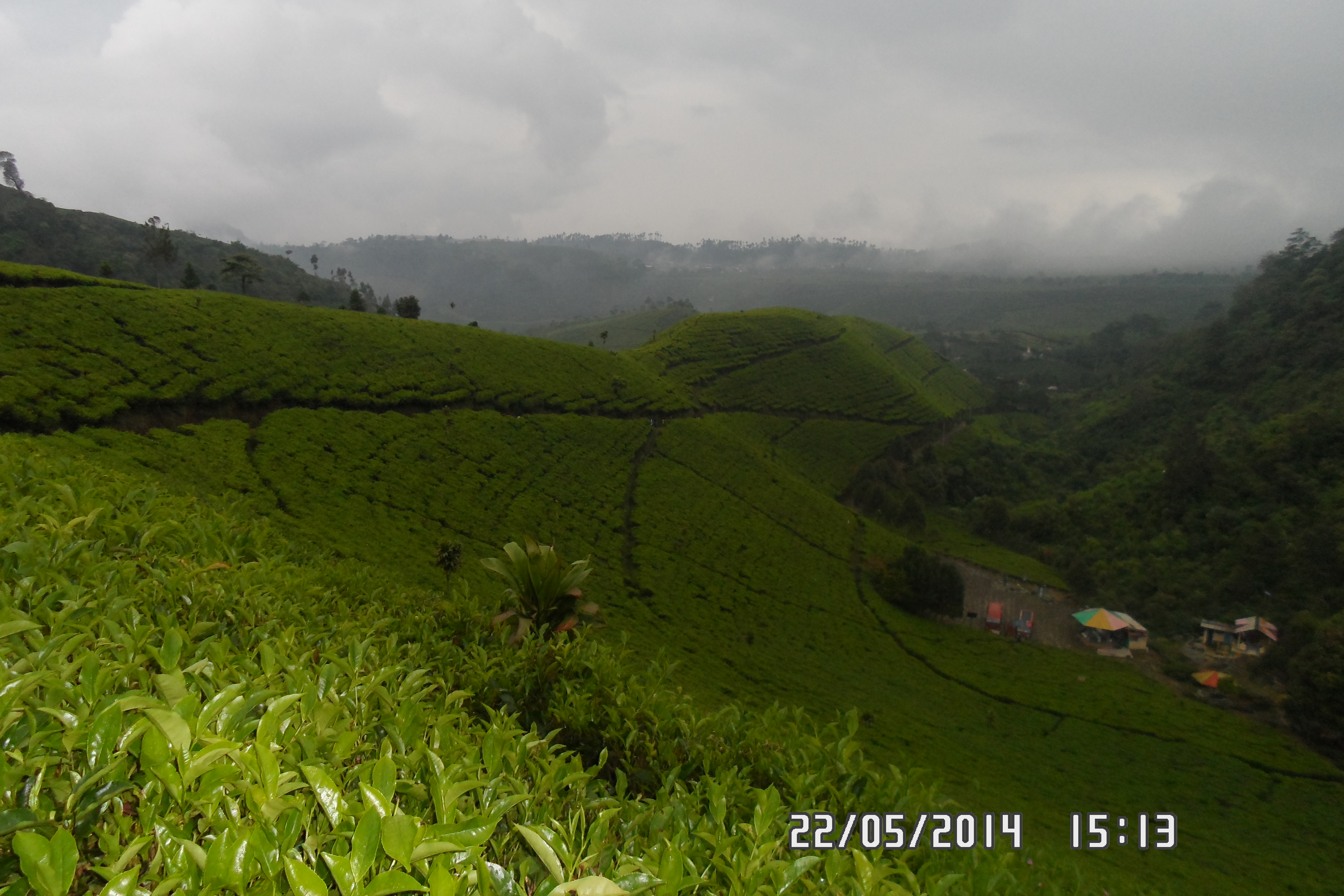 Megahnya dan Indahnya hamparan Kebun Teh di Desa kaligua Brebes Jawa Tengah